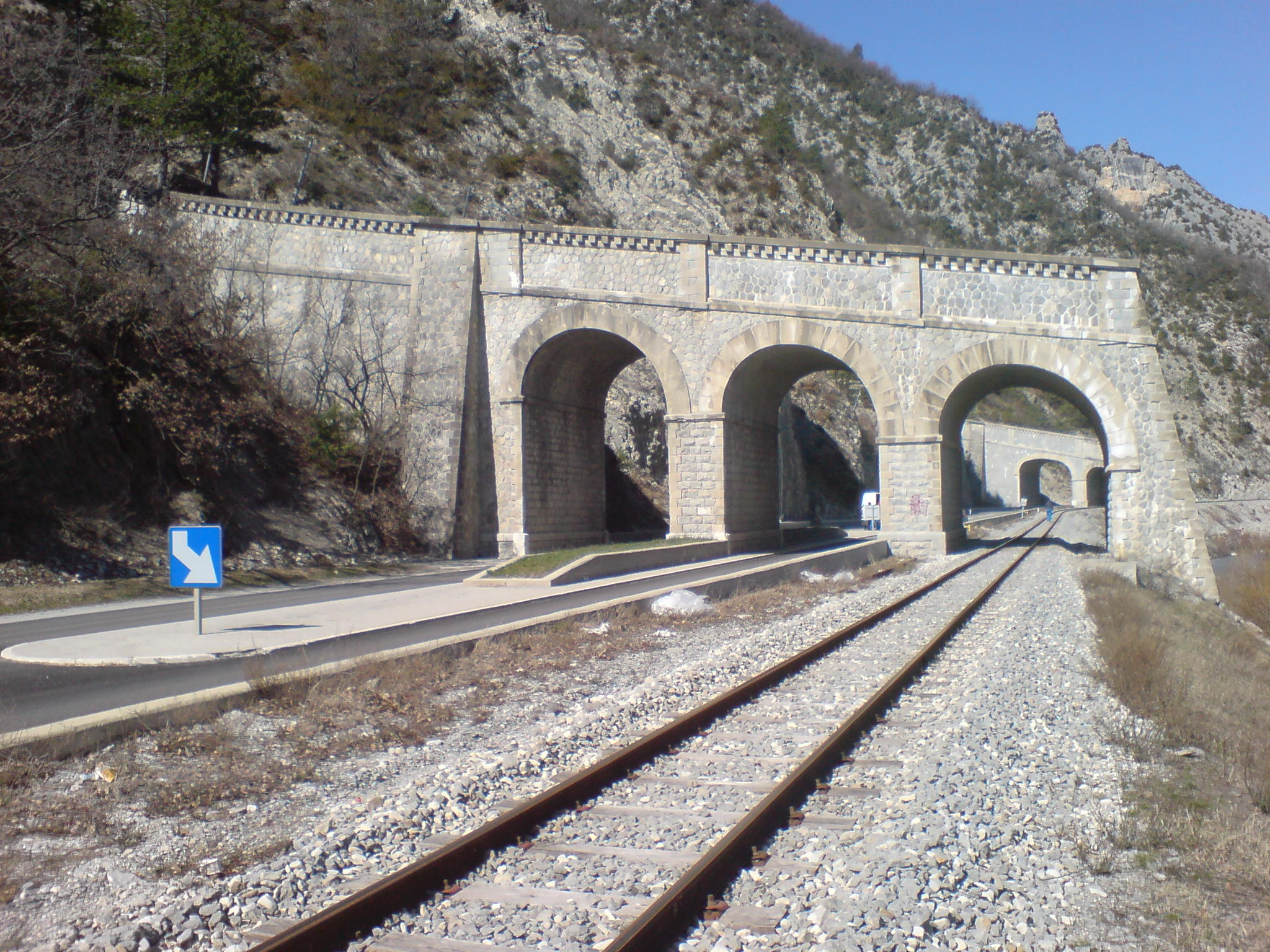 Ouvrage oriental de l’ensemble dit « Ouvrages des Éléphants » (à cause de la massivité de la construction originelle). Il passe au-dessus de la route nationale 202 (France) et de la ligne Nice—Digne des chemins de fer de Provence, et se situe sur la commune d’Entrevaux. L’arche surmontant la route a été doublée.